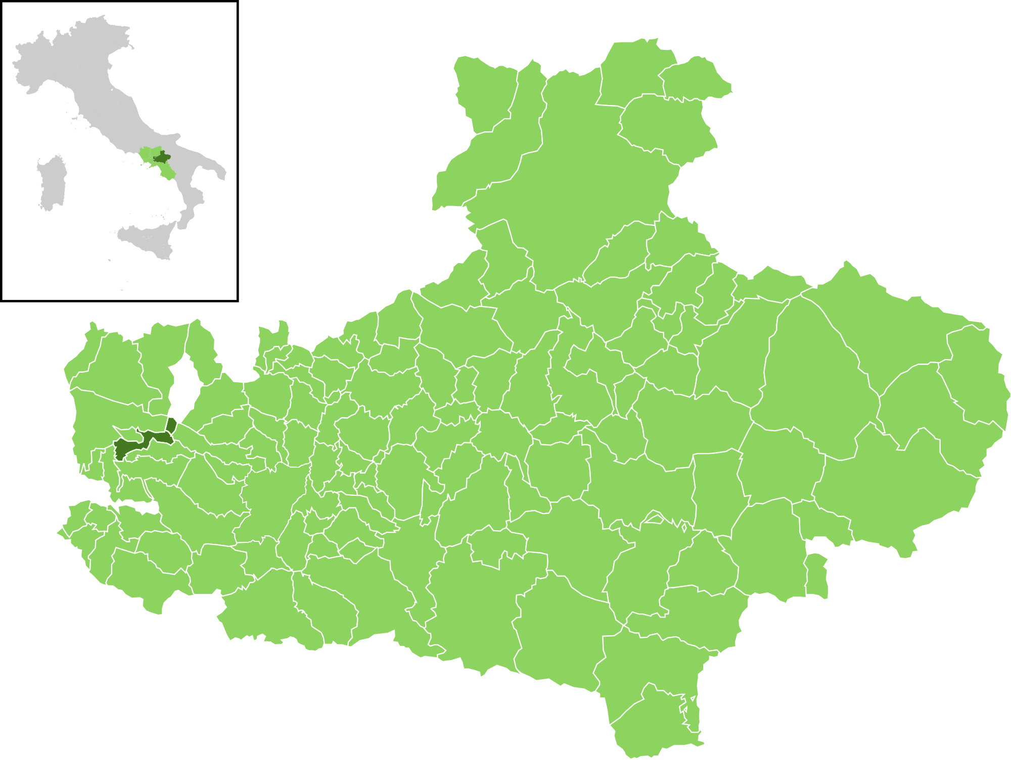 Posizione del comune all'interno della provincia di Avellino